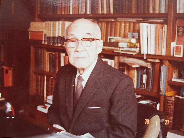 齋藤勇の人物写真 1979年1月27日、自宅書斎にて撮影